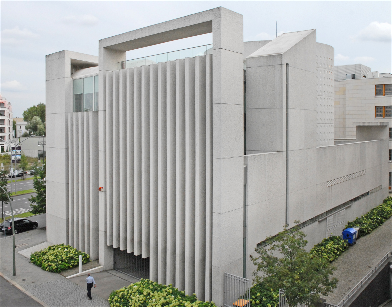 L'Ambassade du Mexique vue depuis l'Ambassade des pays nordiques Les façades de l'Ambassade du Mexique, hautes de 18 m, sont constituées de fines barres de béton incluant des morceaux de marbre. Les architectes sont Teodore Gonzalez de Leon et J. Francisco Serrano, de Mexico. Le bâtiment a été construit entre 1999 et 2000. Site MIMOA